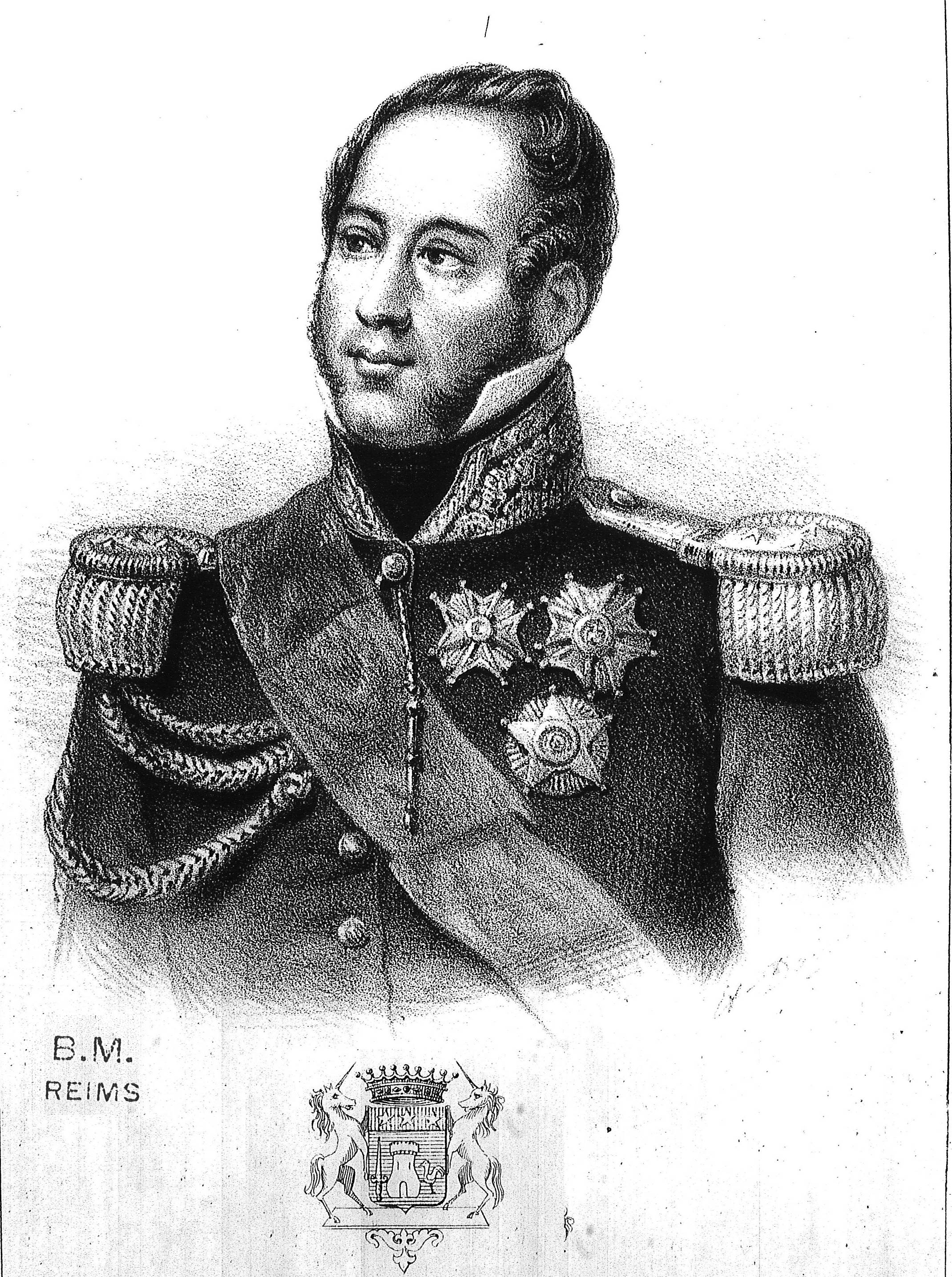 personnalités rémoises série 100, bibliothèque de Reims